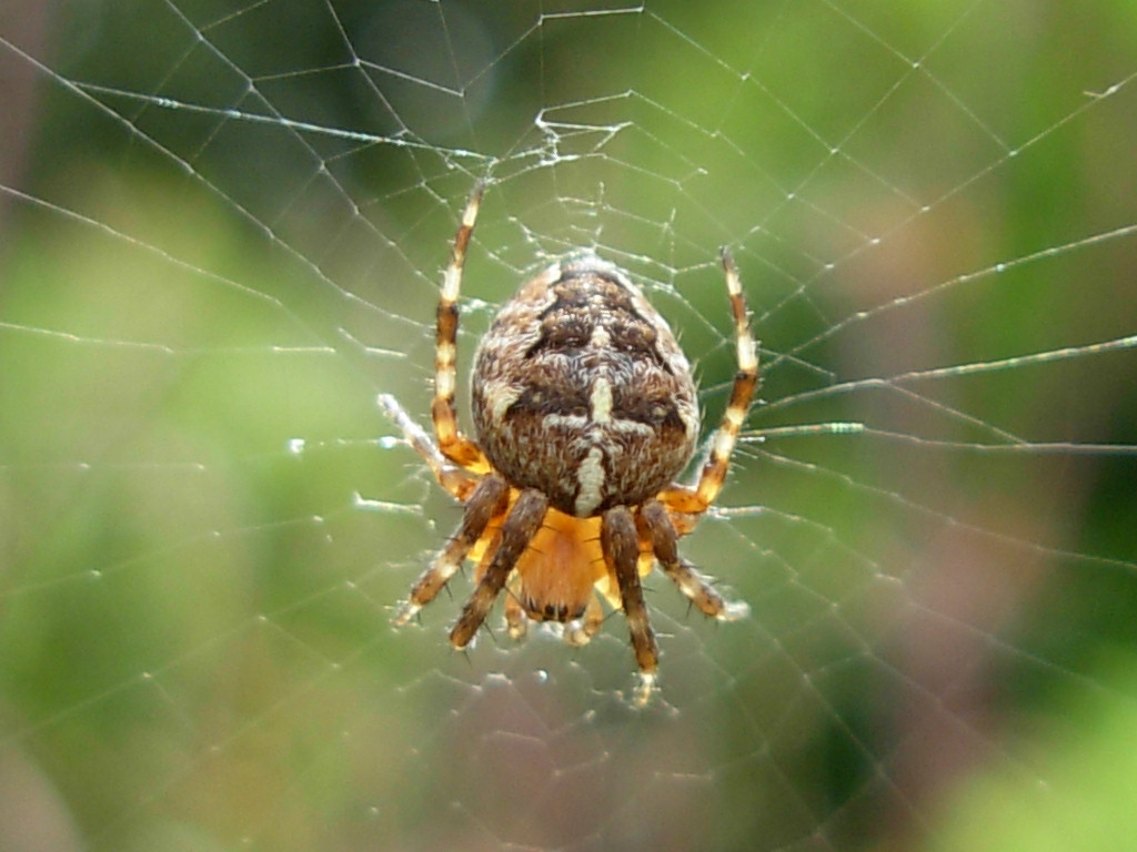 araneus diadematus, épeire diadème.